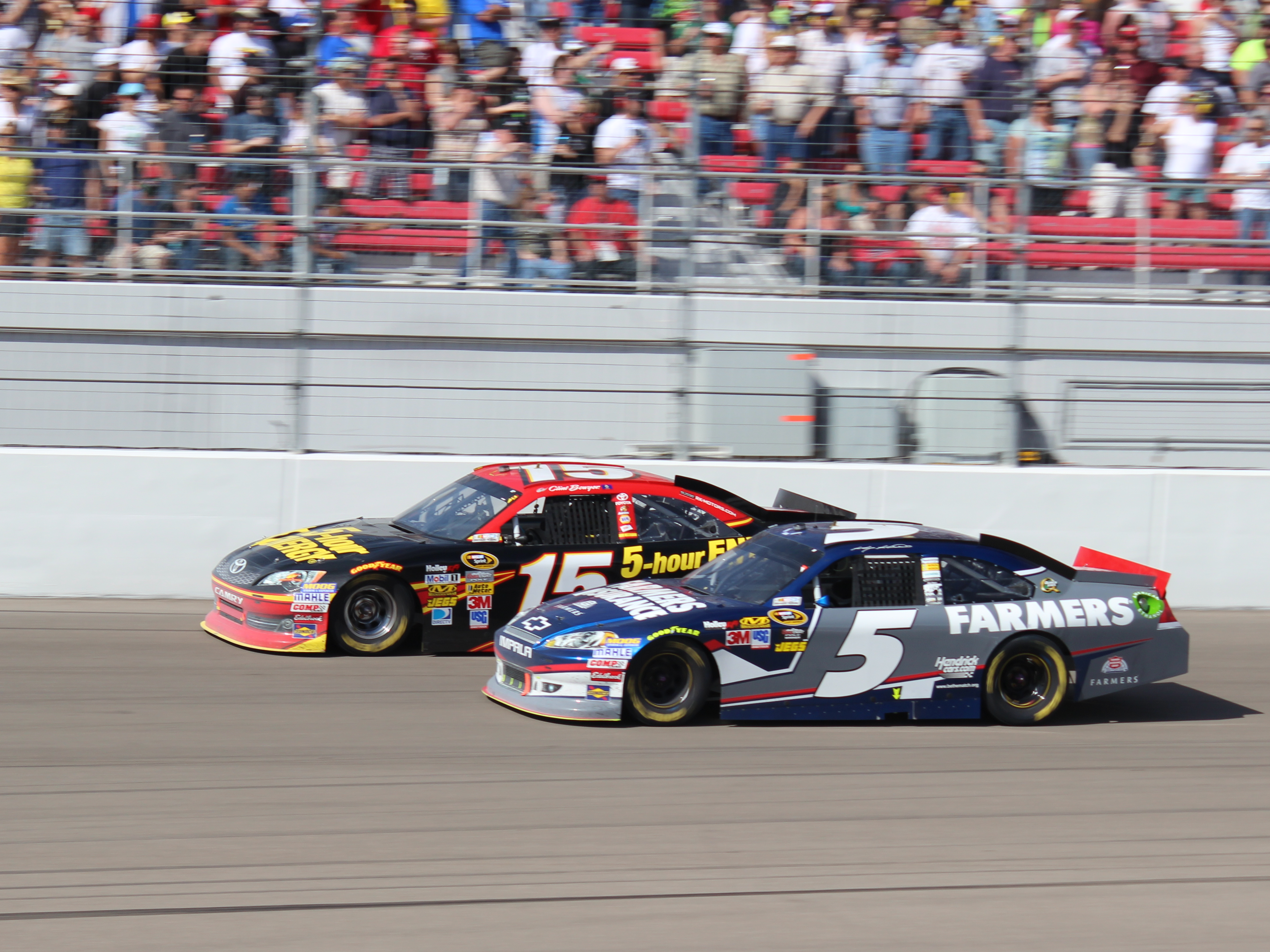 Clint Bowyer vs. Kasey Kahne - 2012 Kobalt Tools 400 in Las Vegas